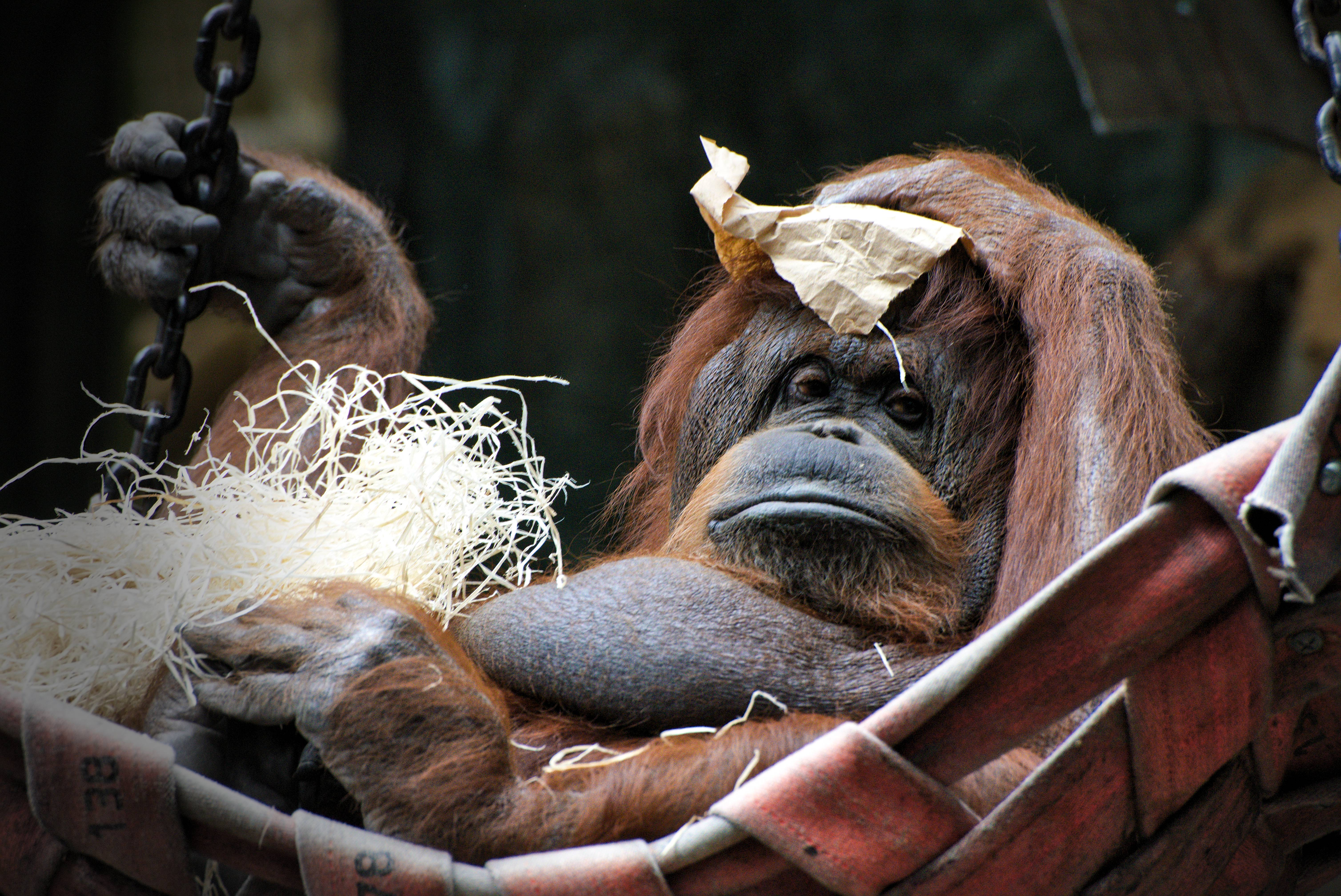 Nénette, Orang Outan, Jardin des plantes, Paris, France